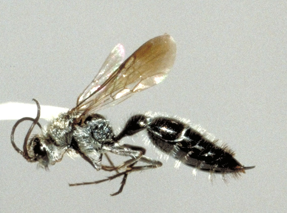 Typhoctes peculiaris mirabilis male (New Mexico) Bradynobaenidae